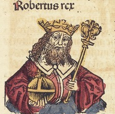 Robert Neapolský